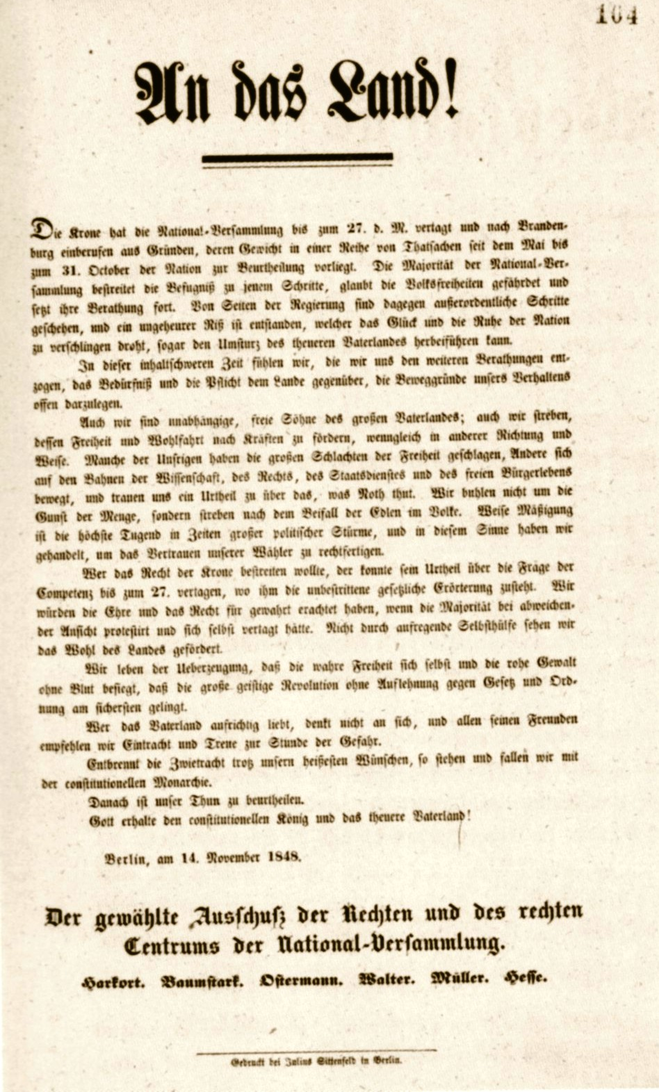 "An das Land" Aufruf preußischer Abgeordneter 1848 - Digitalisierter Volltext unter [1] (Einblattdruck, 21x24cm, Berlin: Sittenfeld)